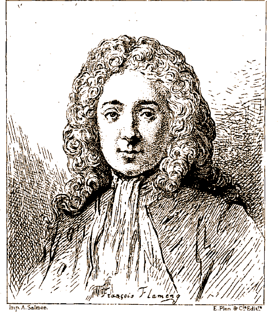 Jean de Jullienne